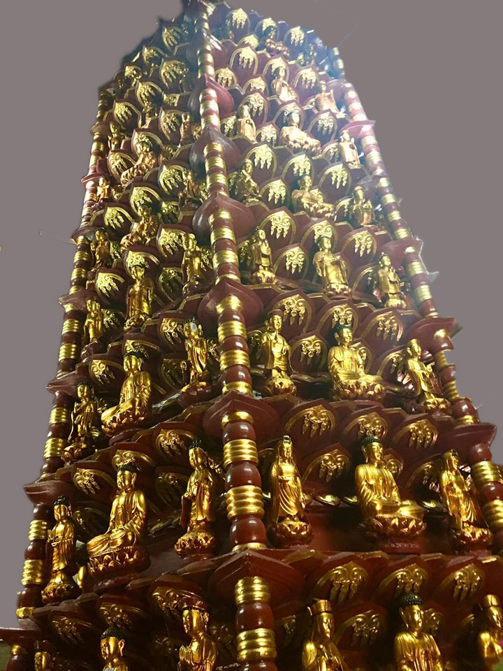 九品蓮花臺在侗午寺,海陽, 越南